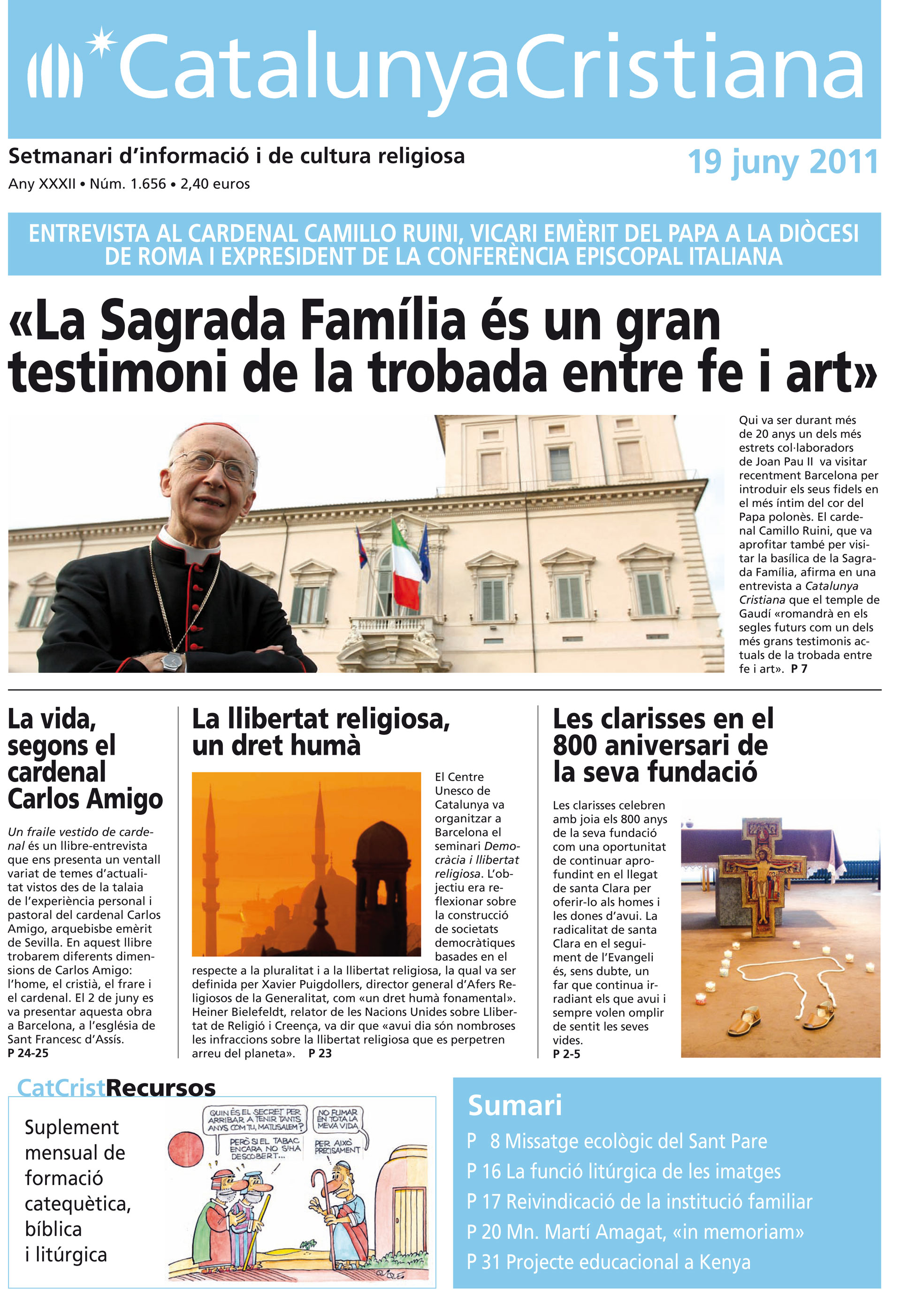 Portada de l'edició de Catalunya Cristiana del 19 de Juny de 2011